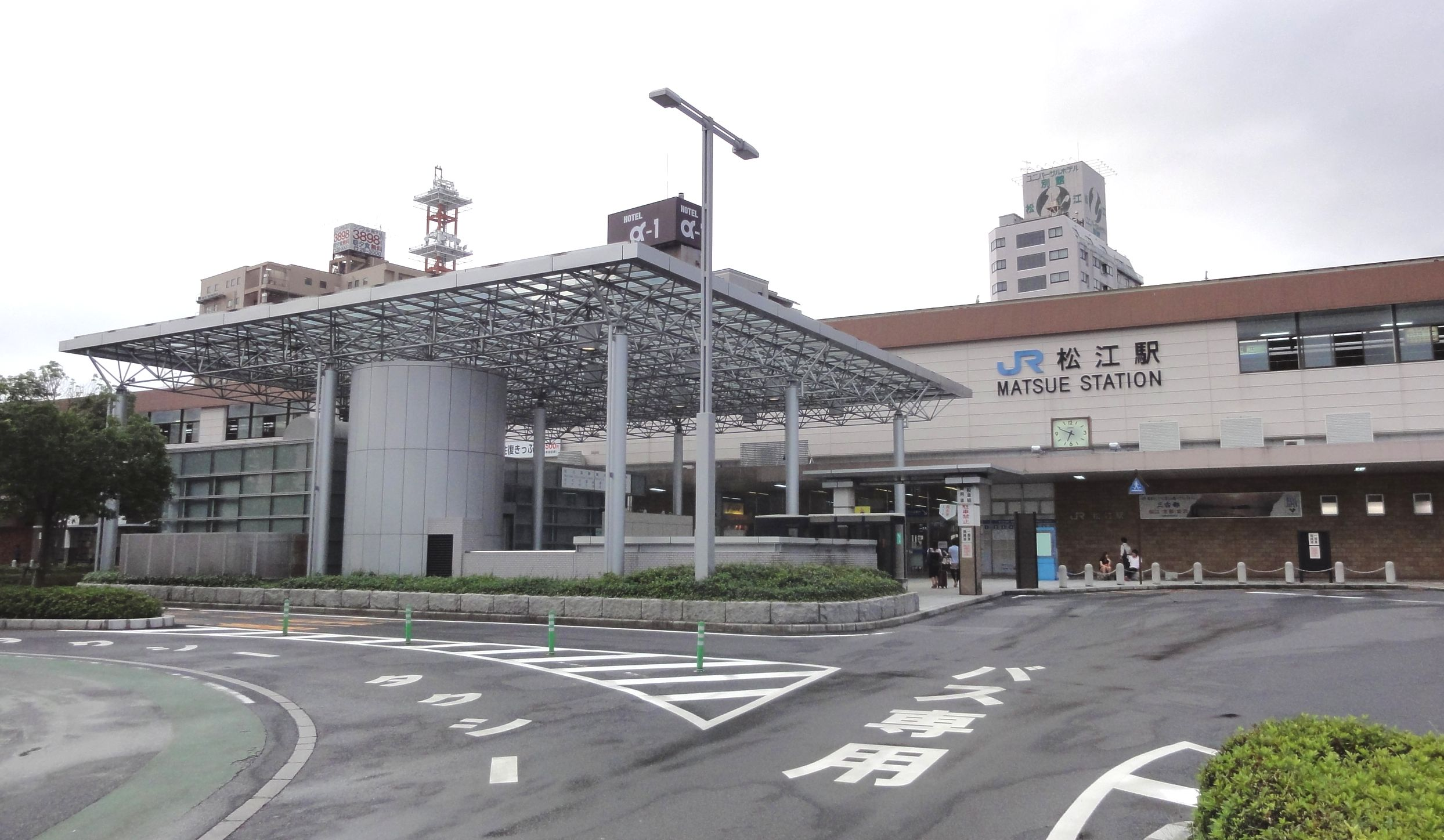 松江駅